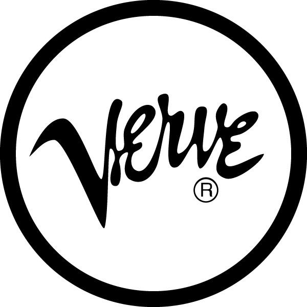 Logo von Verve Records